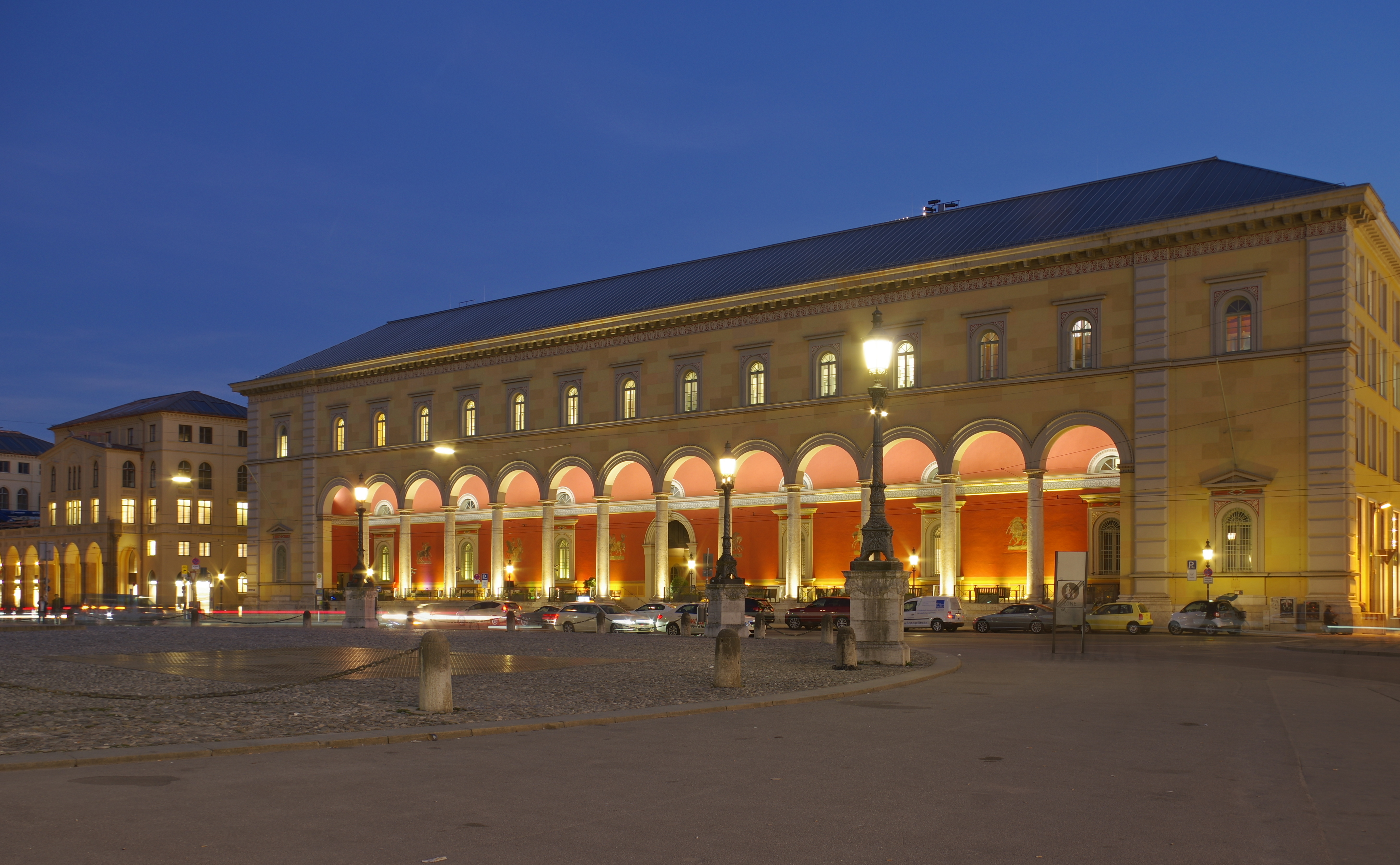 München, Maximilianstraße 2, Palais Toerring-Jettenbach, Akten-Nr. D-1-62-000-5761